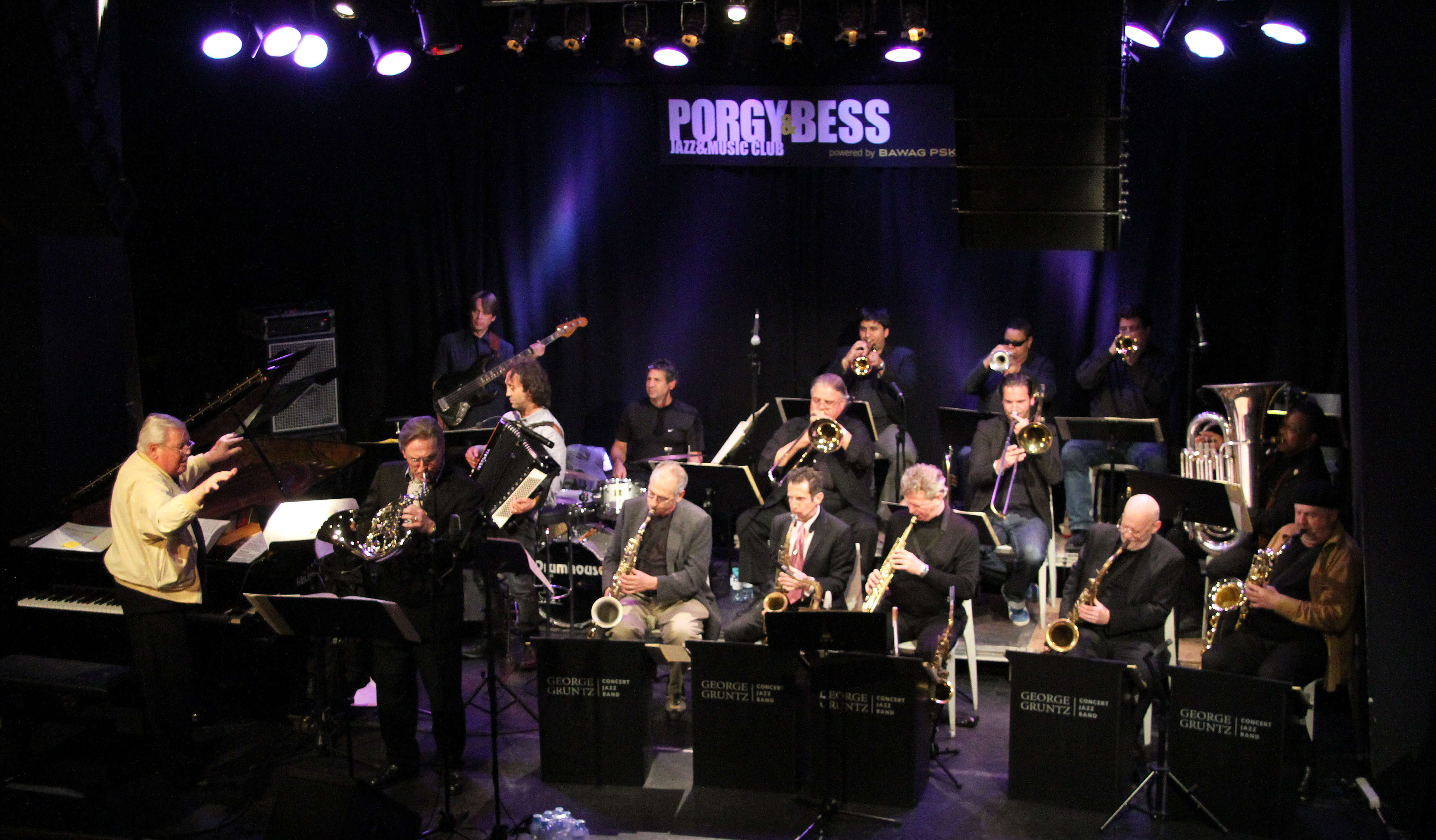 The George Gruntz Concert Jazz Band 04.05.2011 in Wien